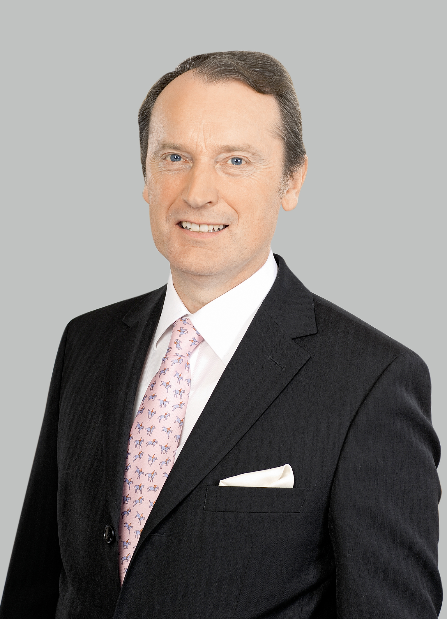 Dr. Hans-Walter Peters, Präsident des Bundesverbandes deutscher Banken e.V.